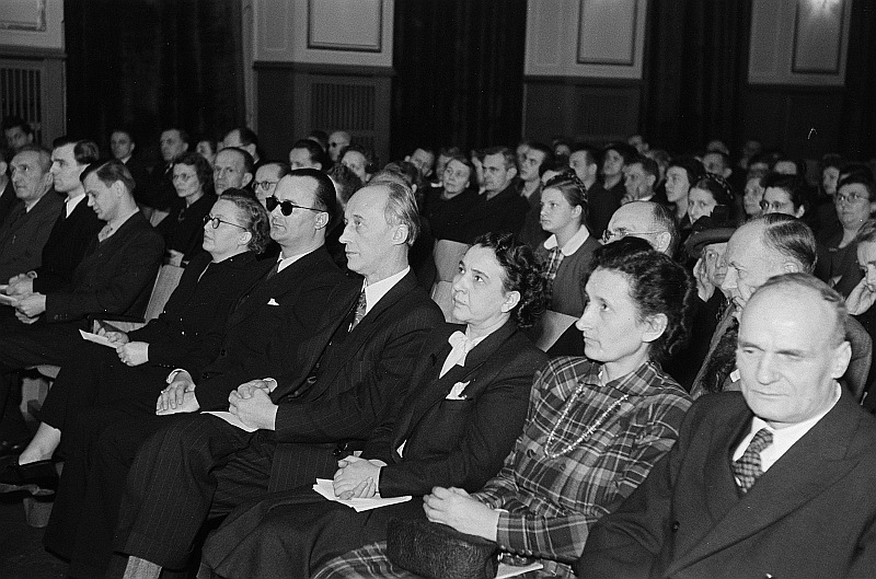 Original image description from the Deutsche Fotothek Blick auf die Zuschauer mit Johannes Dieckmann und Staatssekretärin Ruth Fabisch